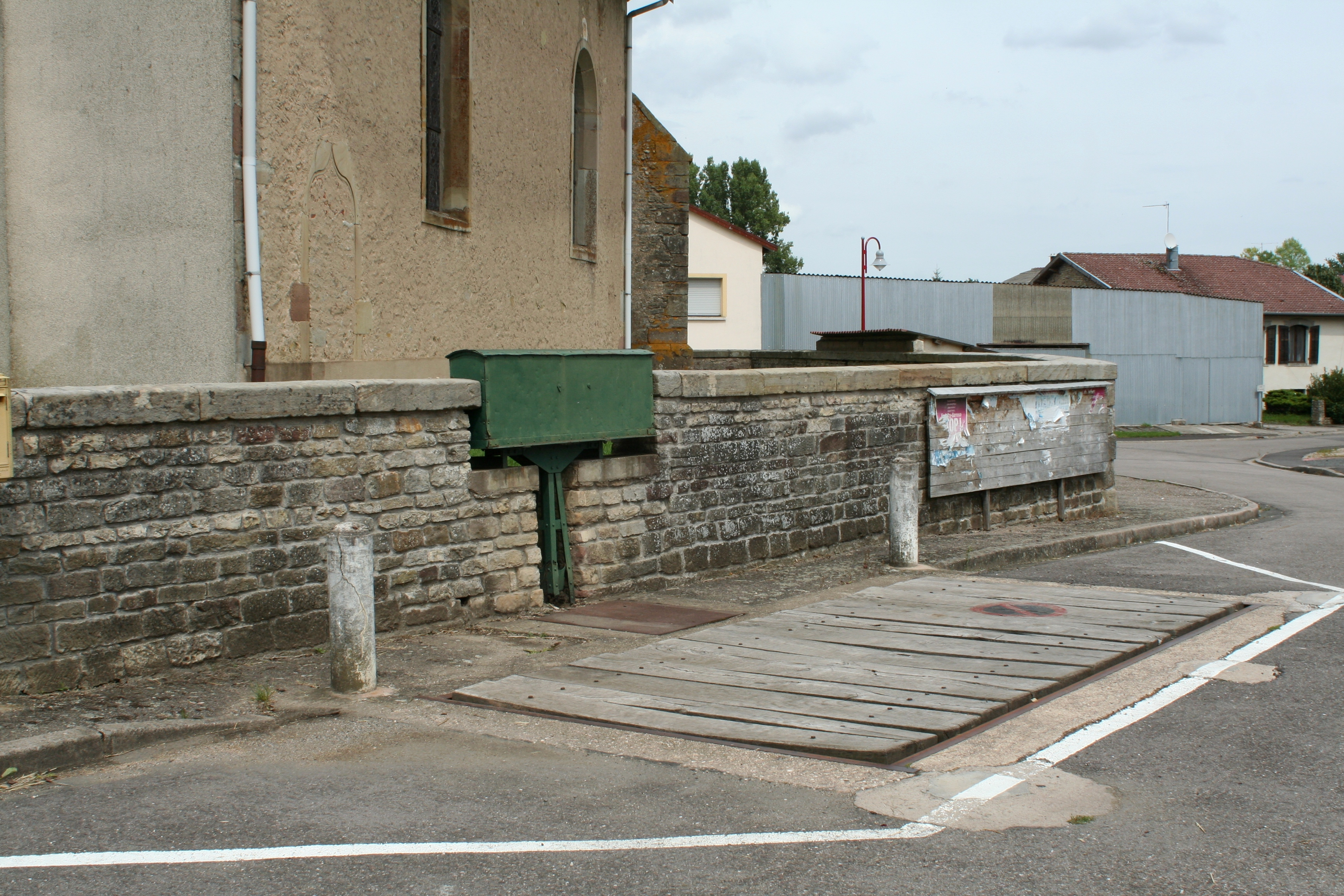 Balance de Saint-Maurice-sur-Mortagne (Vosges)